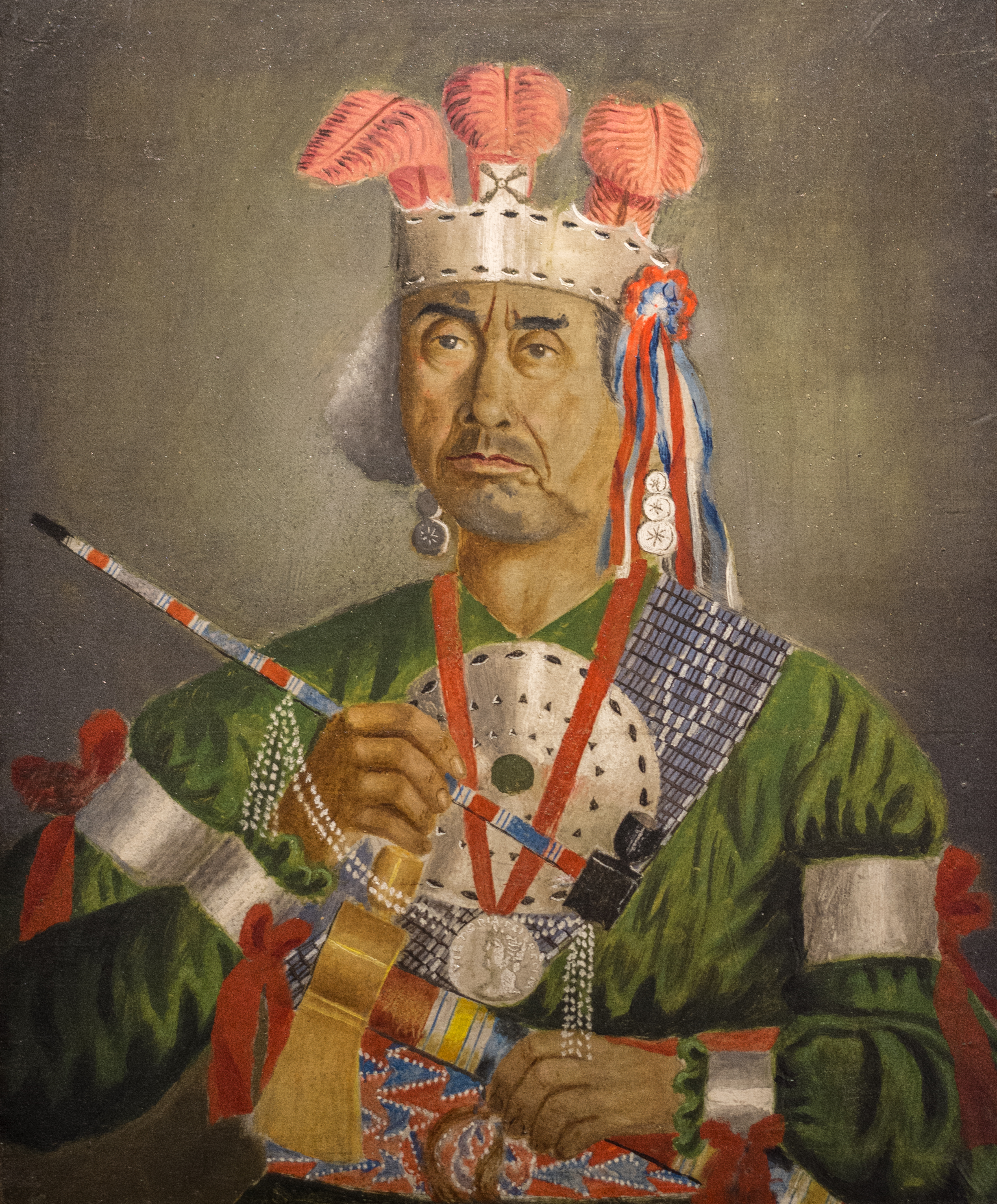 Self-portrait